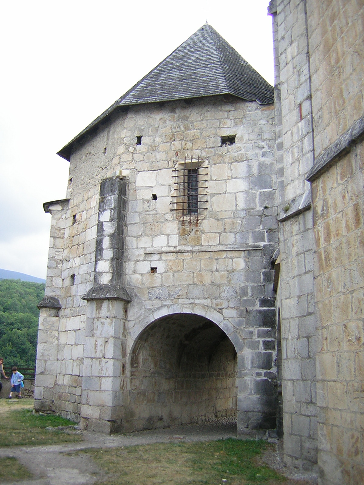 Saint-Bertrand-de-Comminges: catedral de Santa María